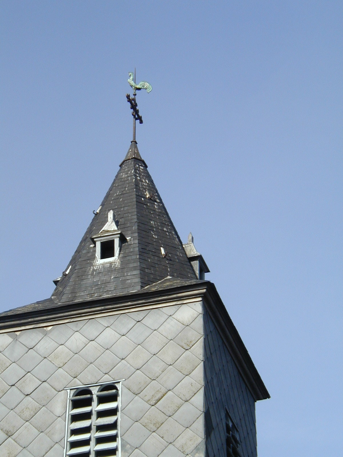 Tour-iliz Tortequesne.